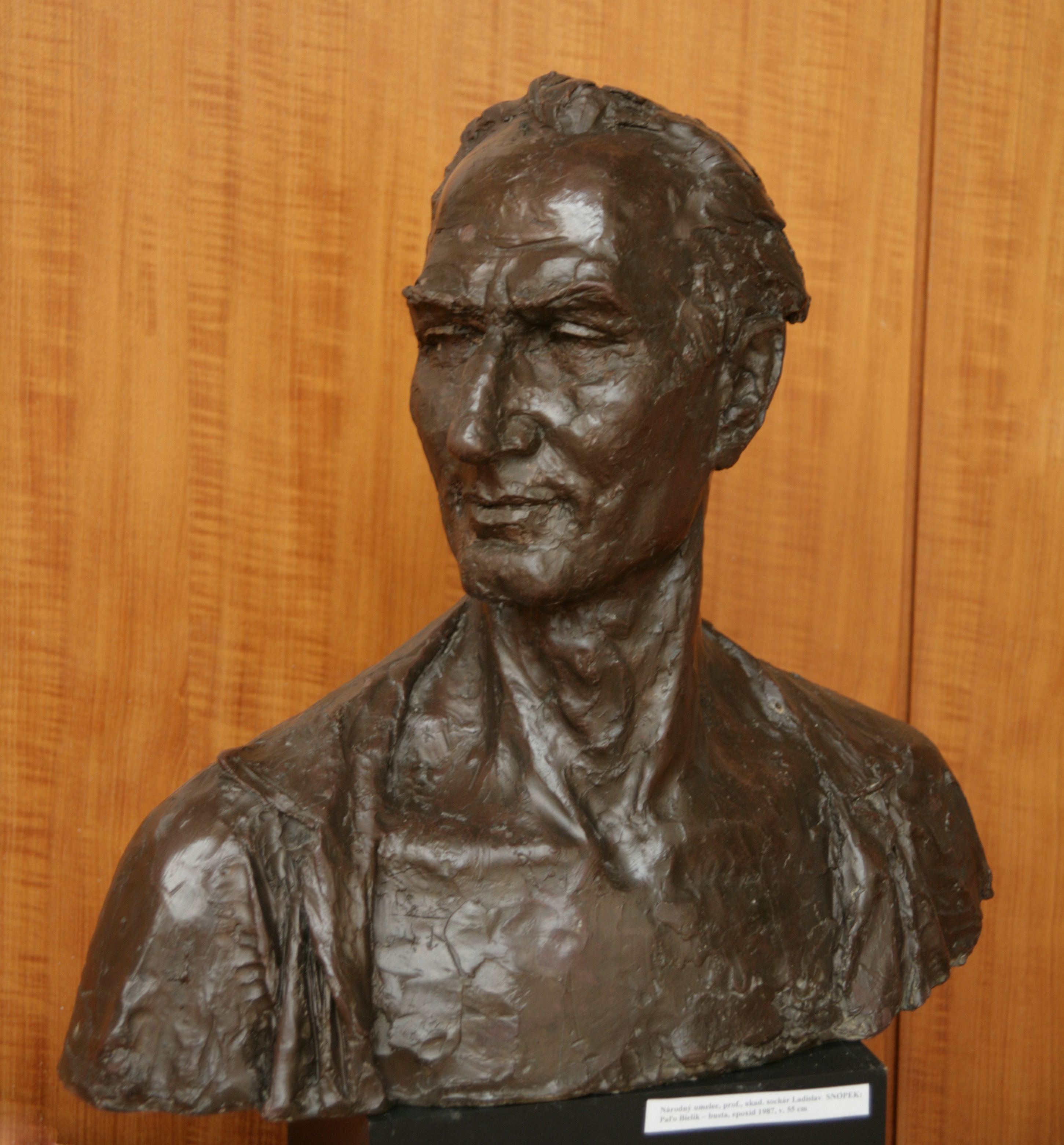 Busta účastníka Slovenského národného povstania partizánskeho veliteľa Paľa Bielika. Jej autorom bol v roku 1987 Ladislav Snopek